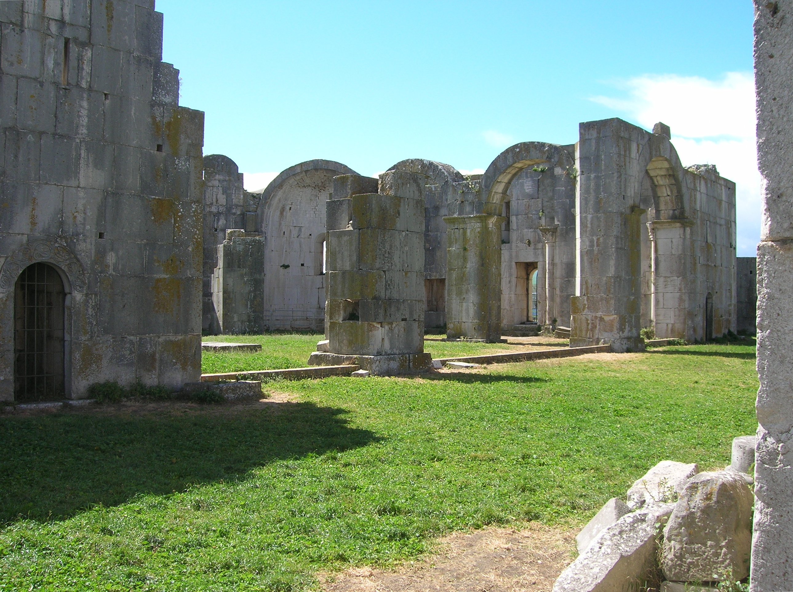 Interno della Chiesa Incompiuta della SS. Trinità, Venosa (PZ)